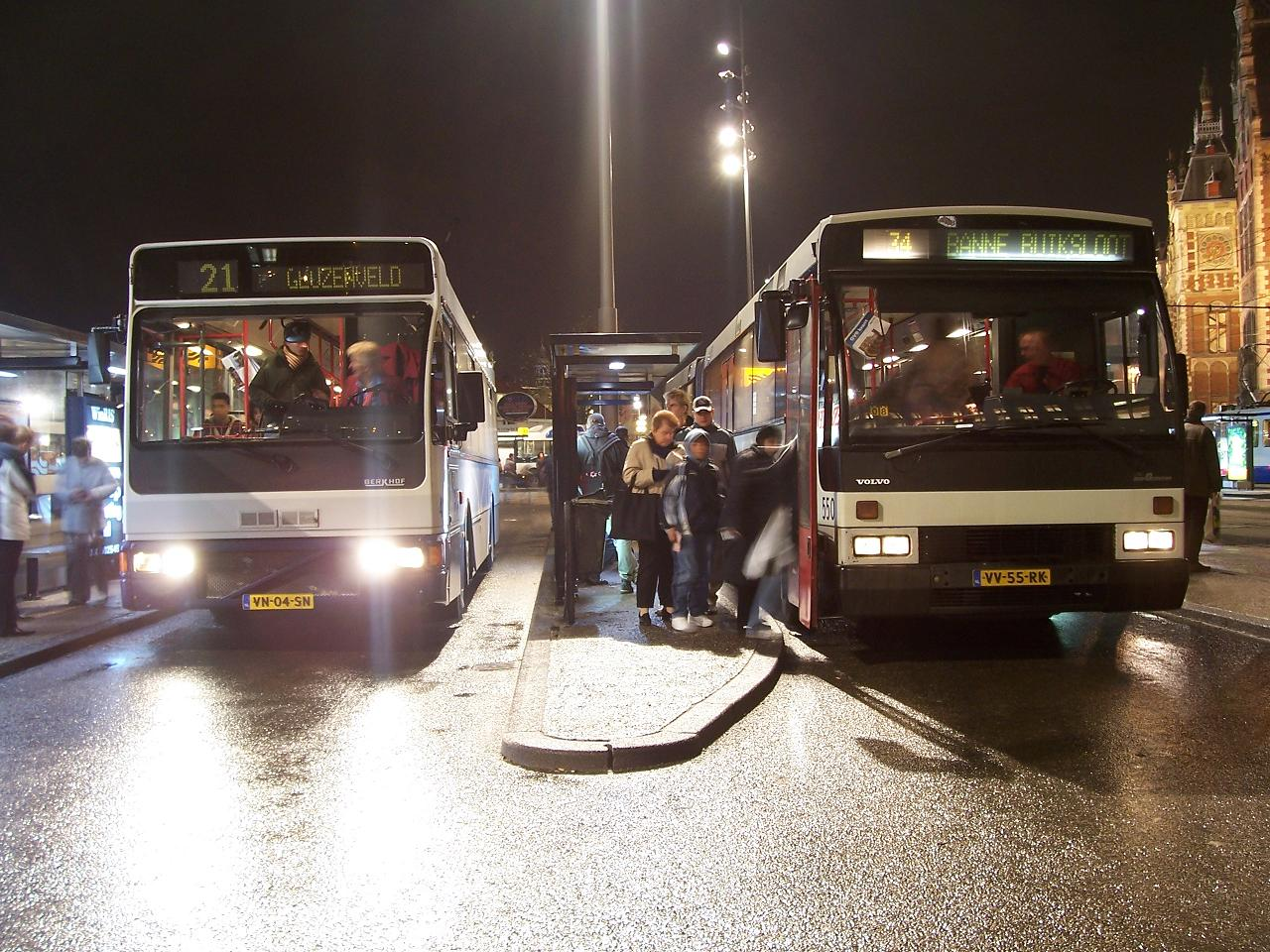 GVB 416 en 550 Amsterdam Centraal.